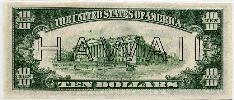 $10 HAWAII Overprint Note.